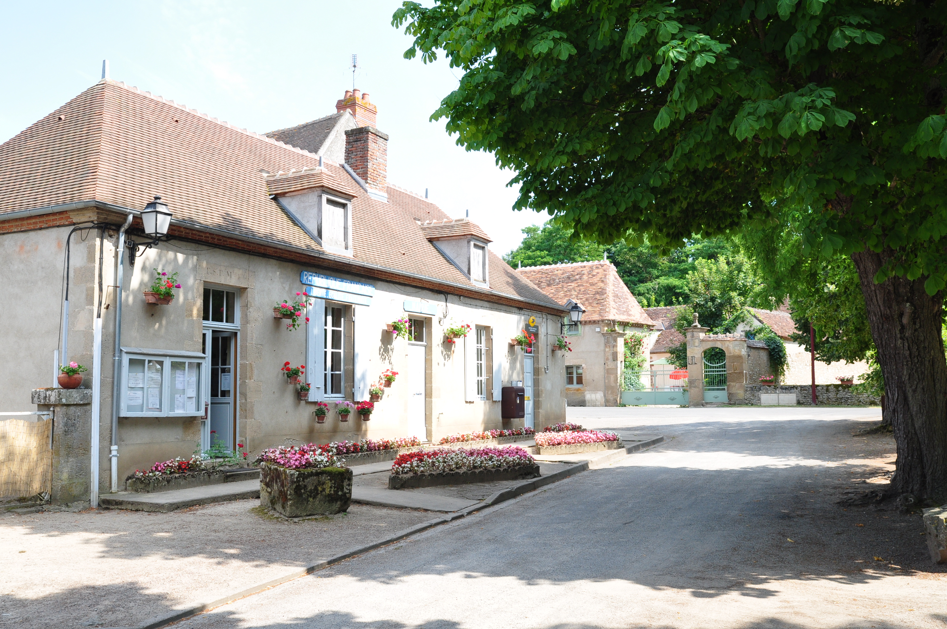 La Mairie en la Poste